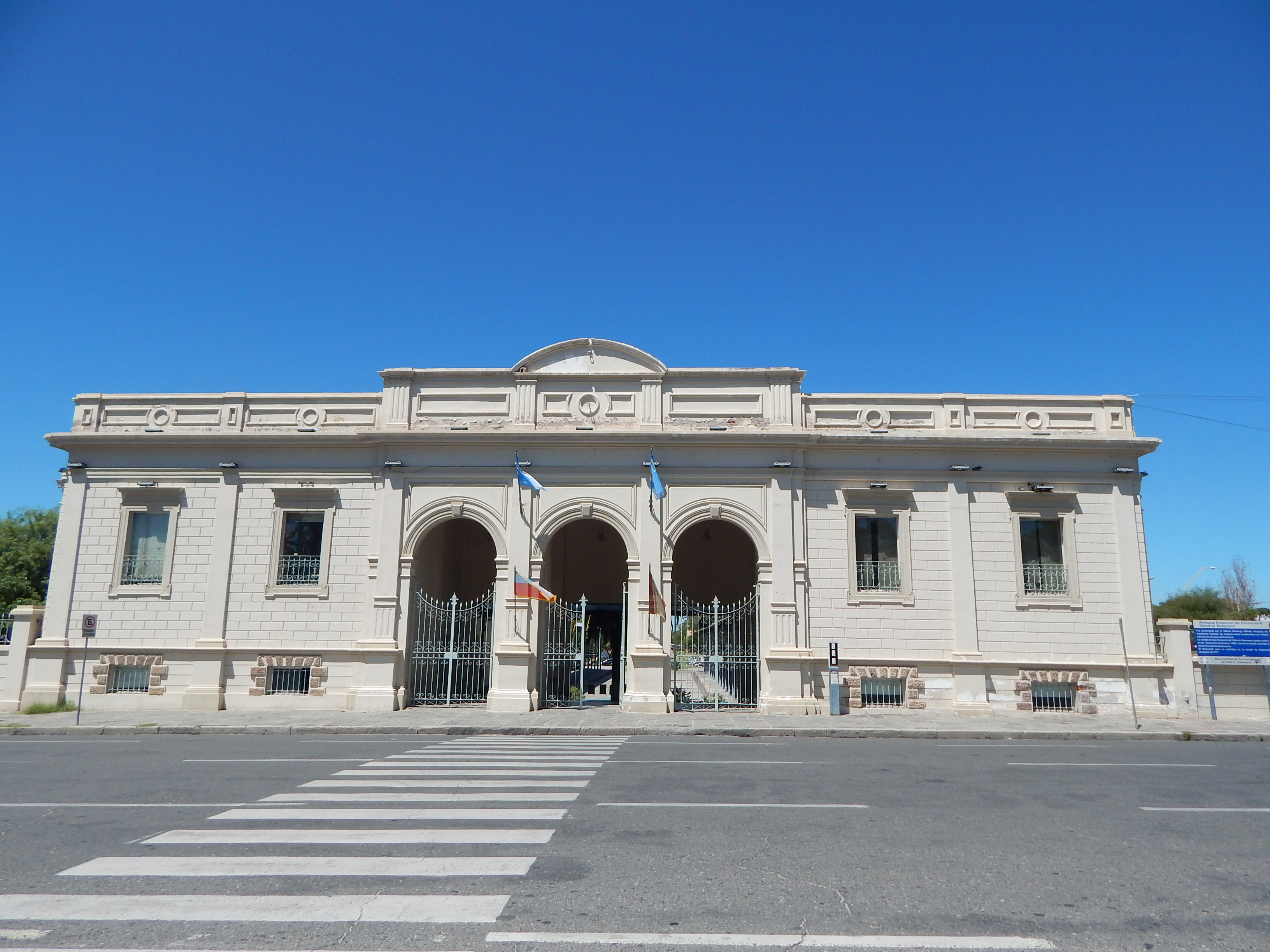 Estación Catamarca, Argentina.